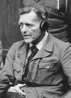 Johann Ludwig Graf Schwerin von Krosigk (Defendant of the Ministries Trial, Nuremberg)